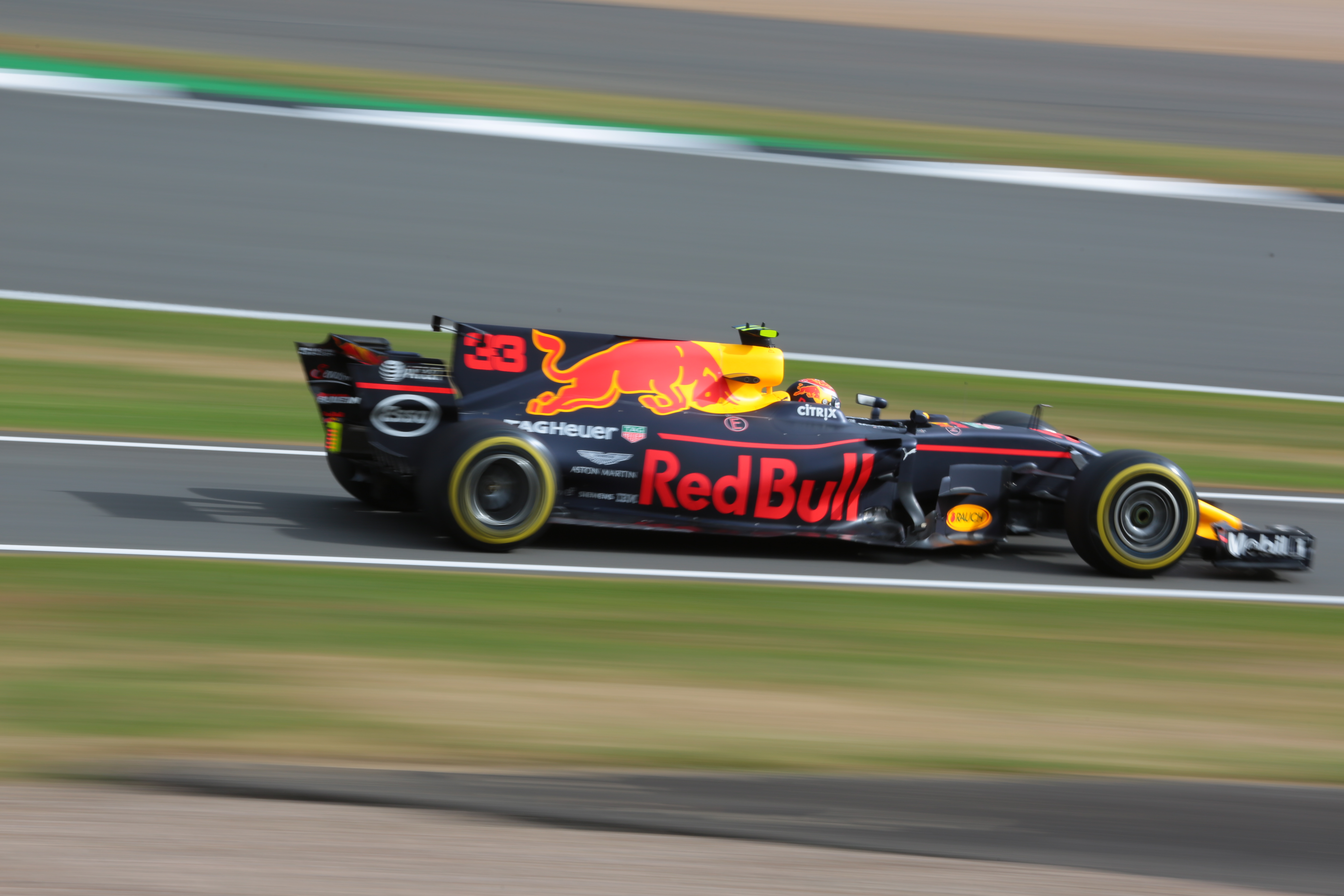 f1